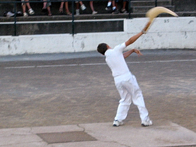 Bidart, partie de Chistéra. Photo prise le 28/07/04 par Harrieta171